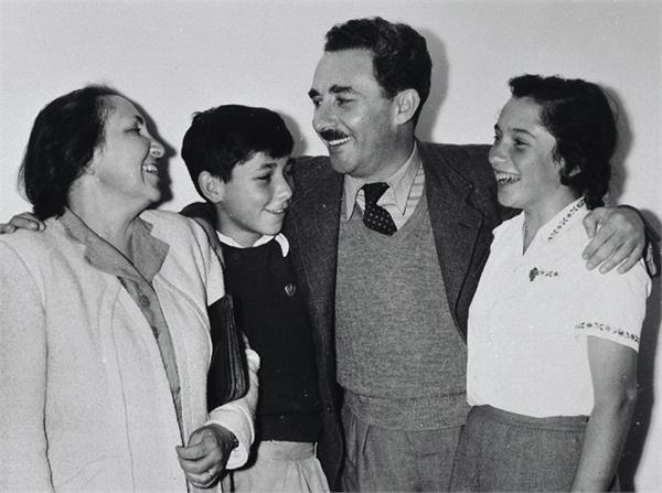 ירושלים - משה שרת בצאתו מלטרון, בחברת משפחתו. בתו יעל בת 16 בנו חיים בן 13 ורעיתו ציפורה